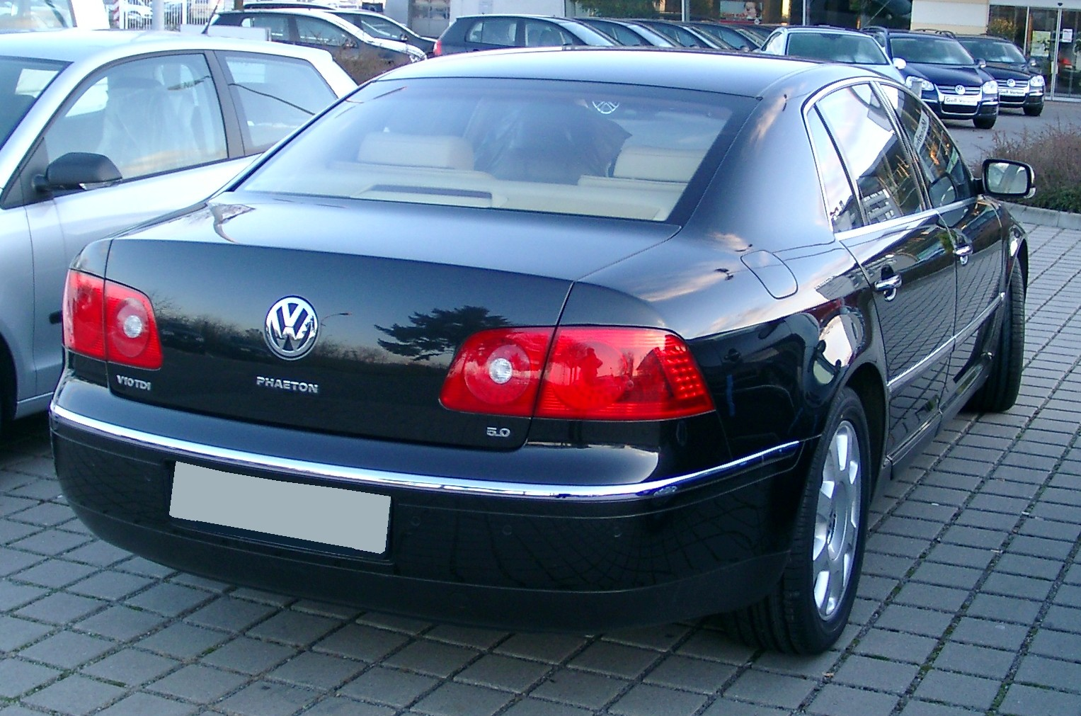 VW Phaeton